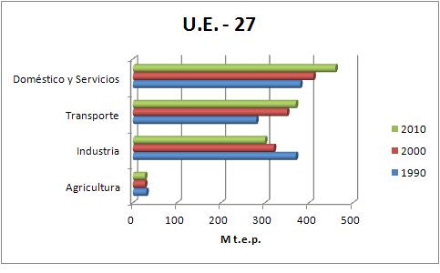 Evolución sectorial del consumo energético final en la U.E.-27. Fuente: Eurostat